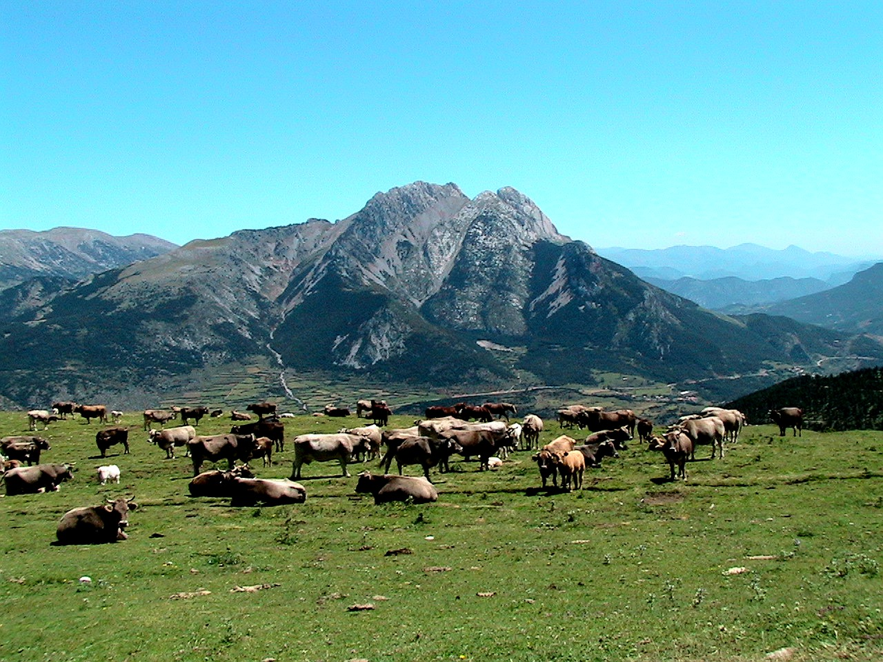 El Pedraforca des de la Serra del Verd This is a a photo of an emblematic summit in Catalonia, Spain, with id: CE-278085006 This is a a photo of a geologic site or geotope in Catalonia, Spain, with id: IEIGC-145